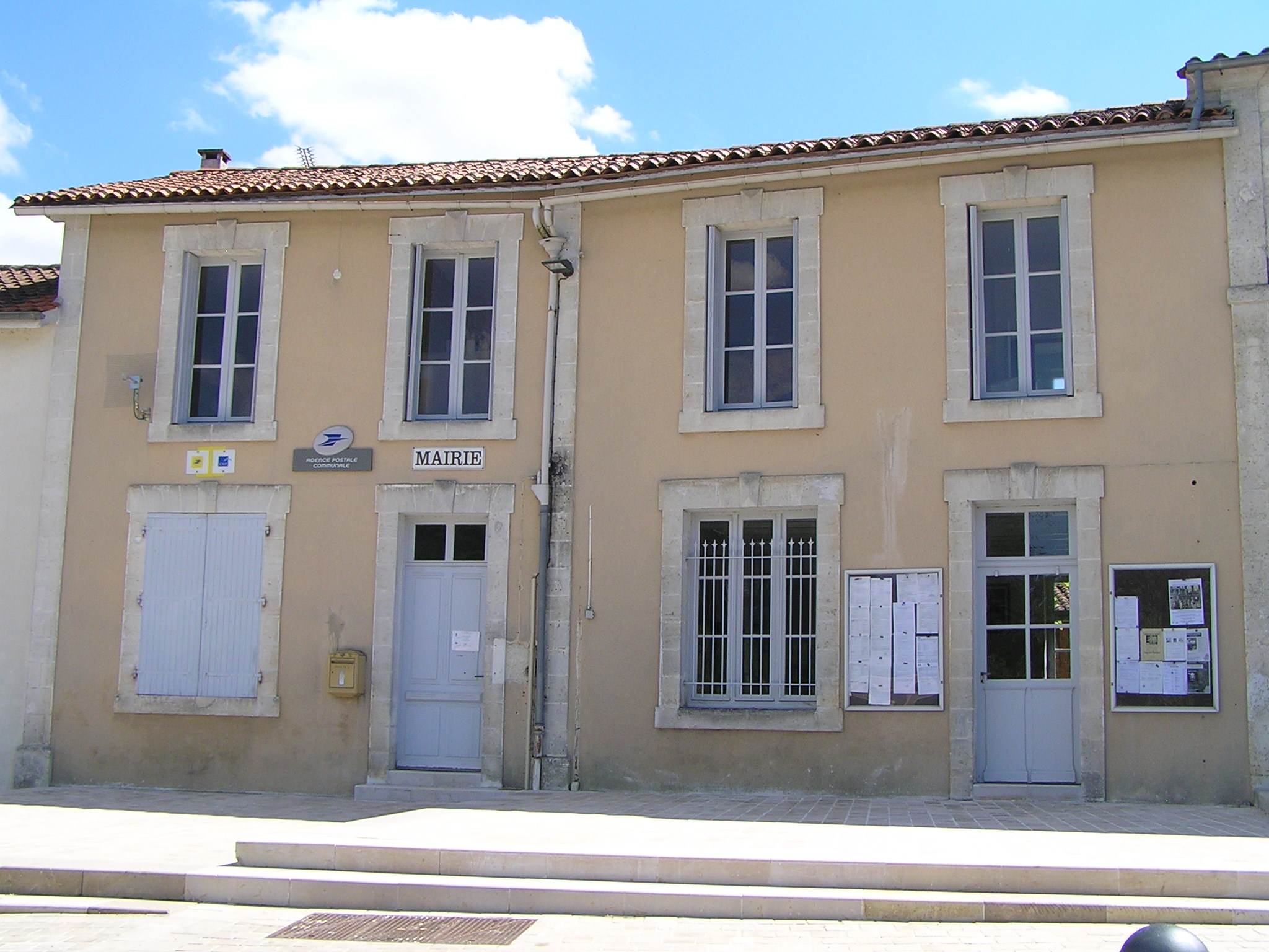 mairie de Brettes